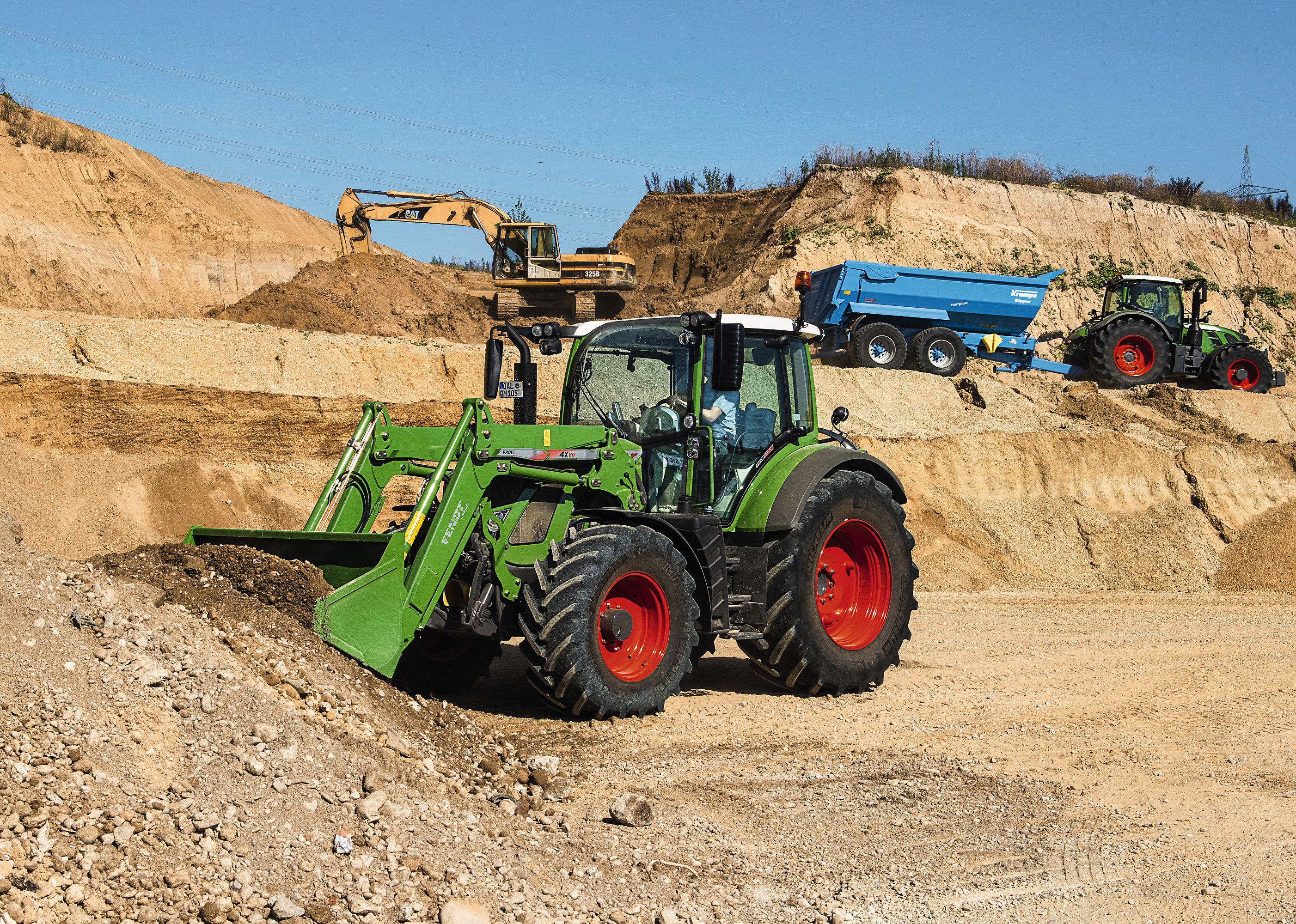 Frontlader Fendt CargoProfi 4 X 80